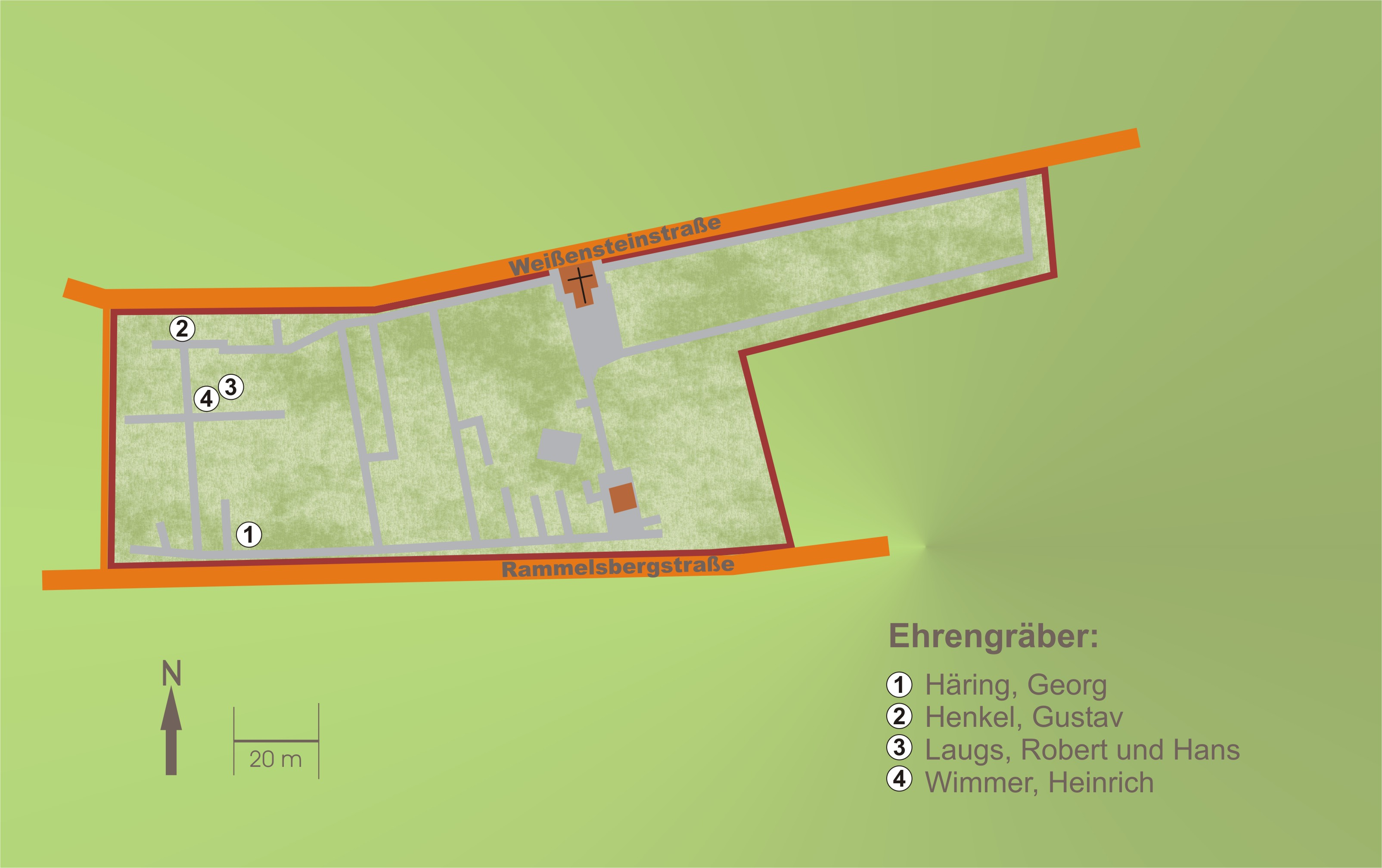 Plan des Friedhofs in Kassel-Wahlershausen (Deutschland)